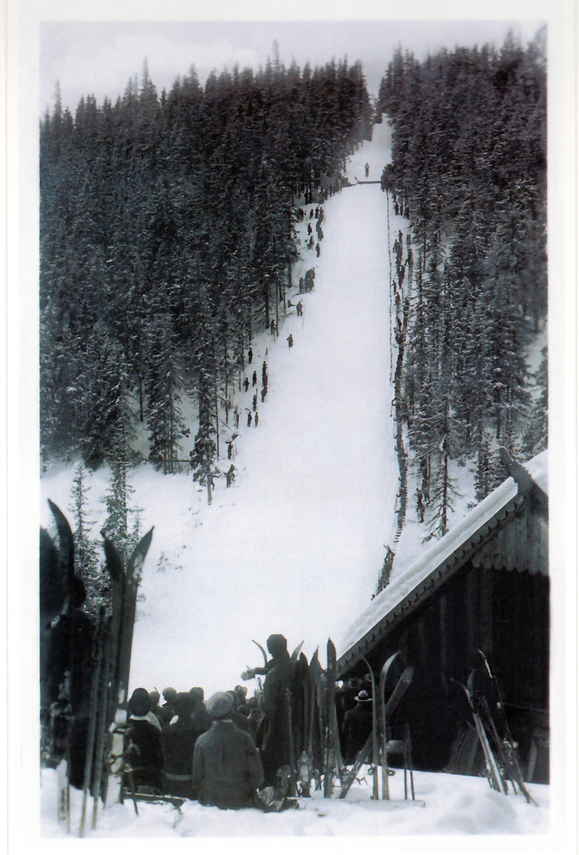 V roku 1924 stál nad Tatranskou Poliankou vo Vysokých Tatrách drevený skokanský mostík - Guhrov mostík a pri ňom Guhrova chatka. Umožňoval skoky dlhé 60 metrov.